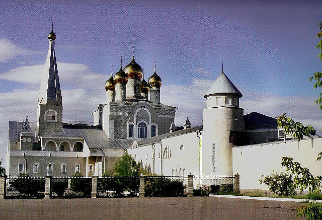 Православный собор в Караганде